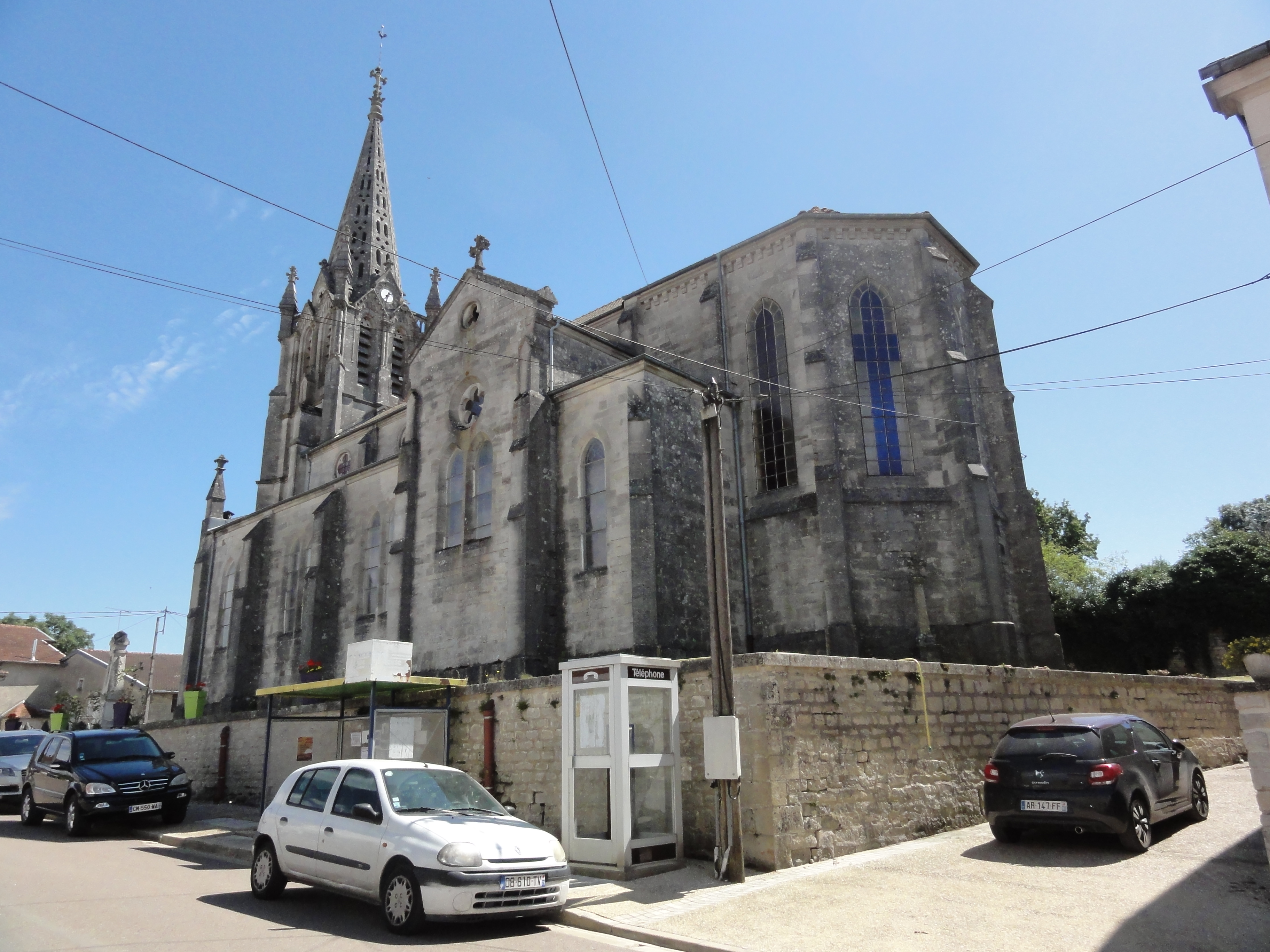 Brauvilliers (Meuse) église